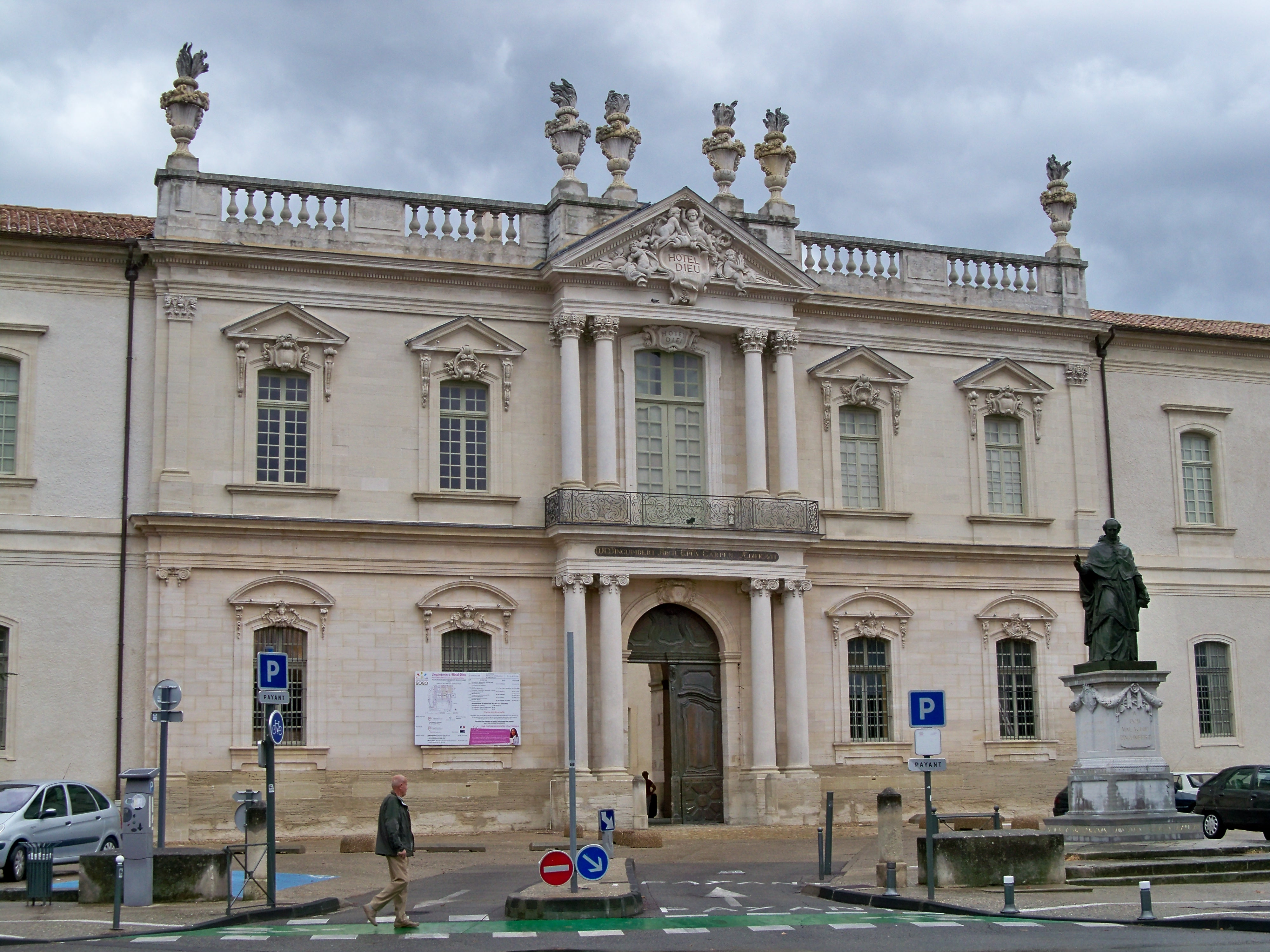 Hotel Dieu de Carpentras (84) .